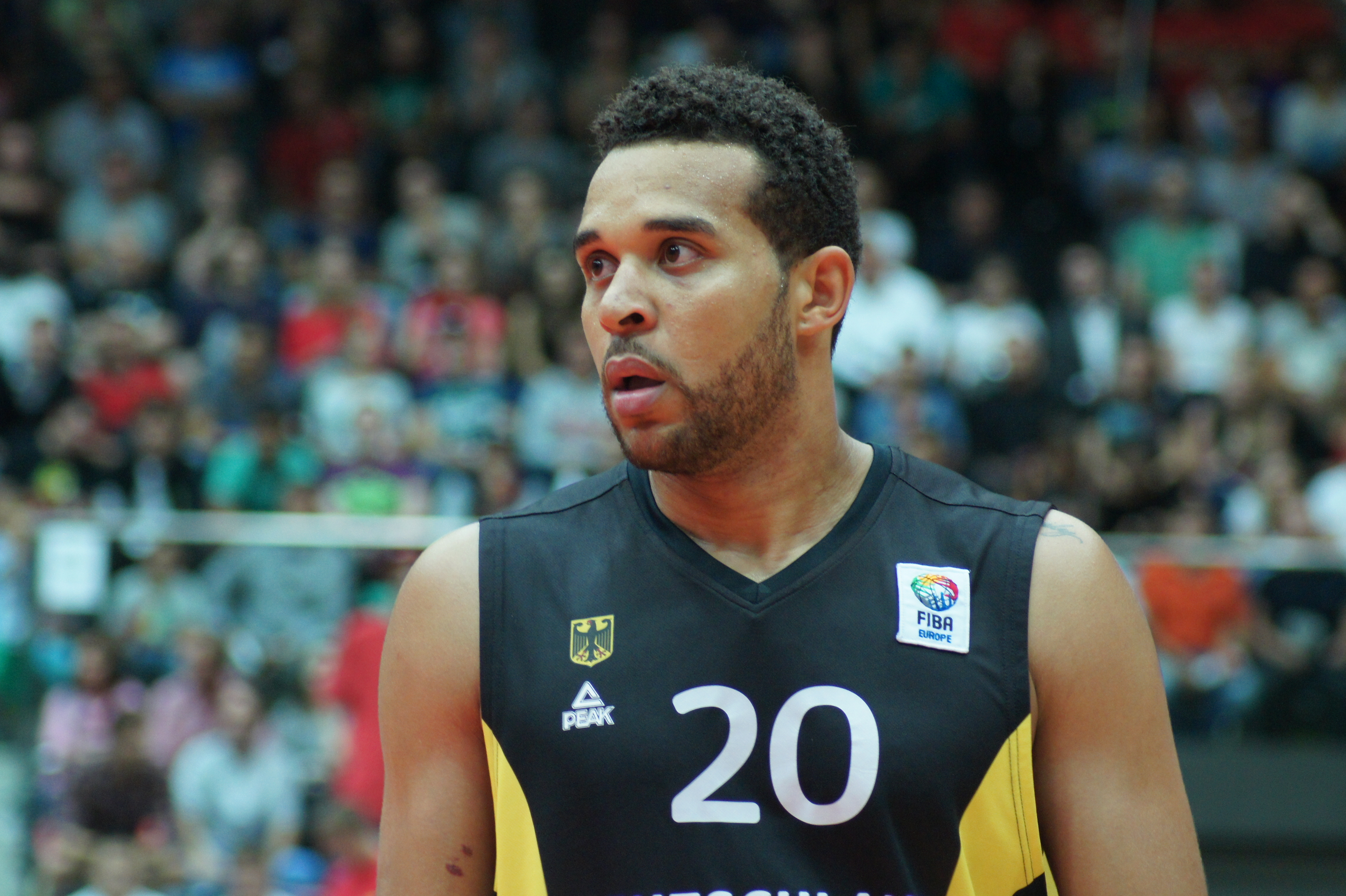 Qualifikationsspiel EuroBasket Österreich - Deutschland, 13. August 2014 im Multiversum Schwechat.